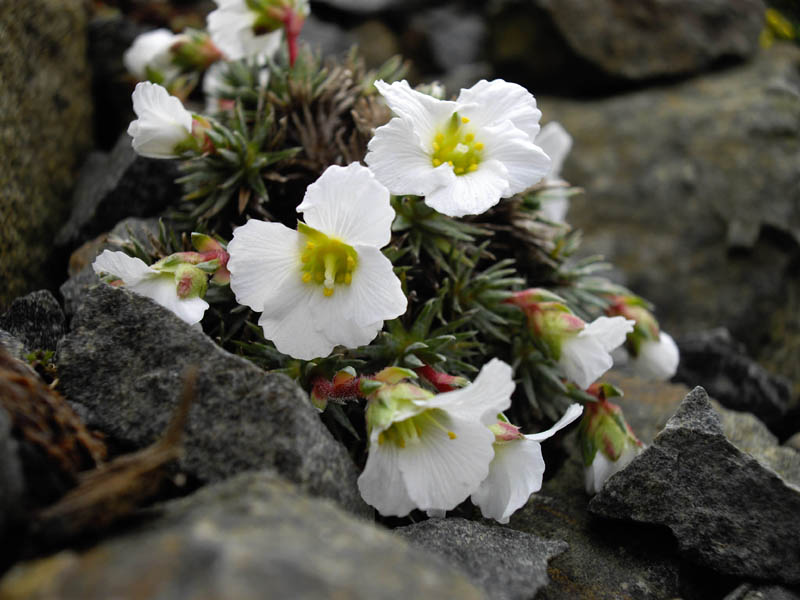 Saxifraga burseriana 'Crenata'